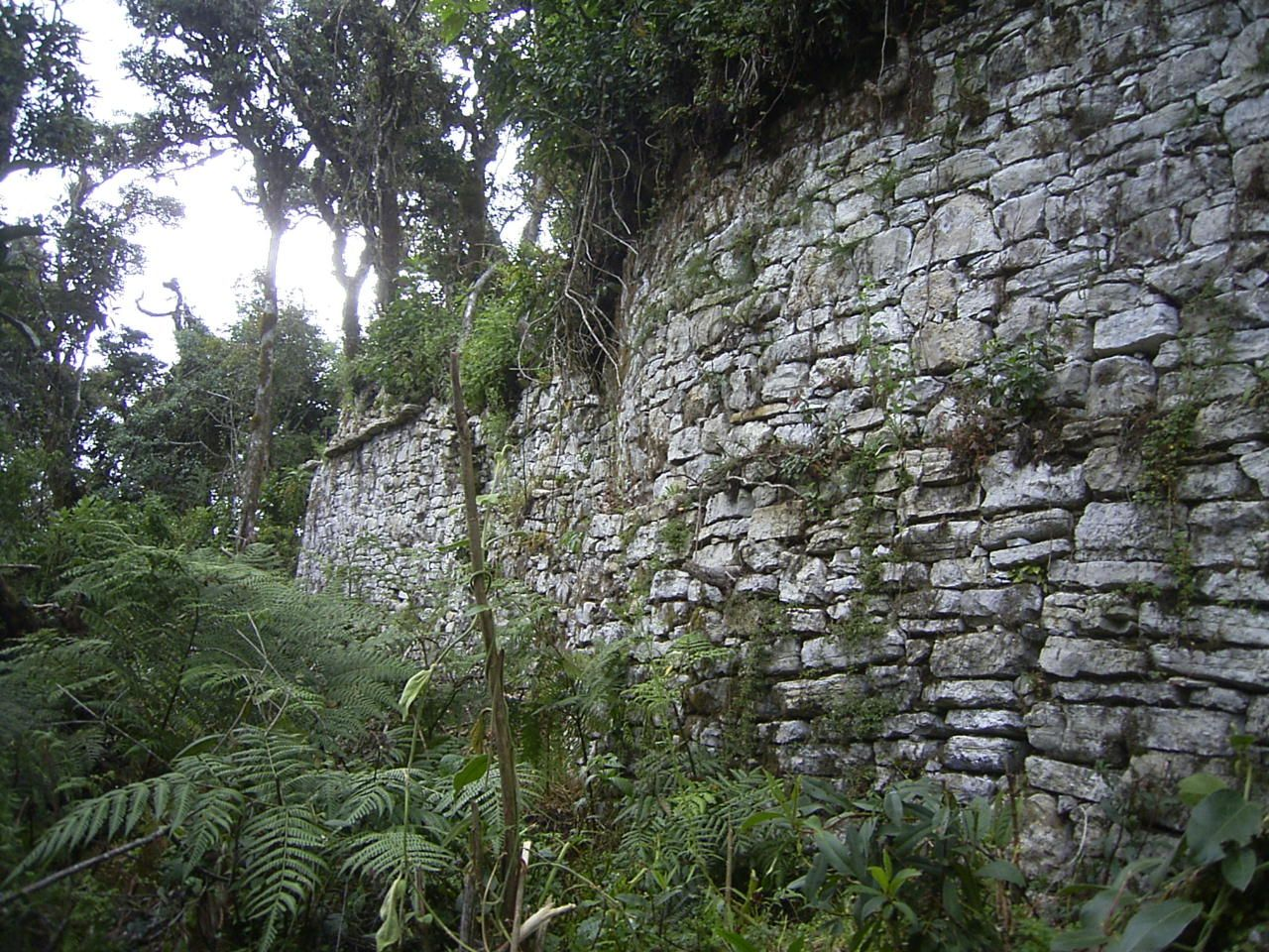 ruinas en el Distrito de Soloco, Provincia de Chachapoyas, Amazonas, Peru.